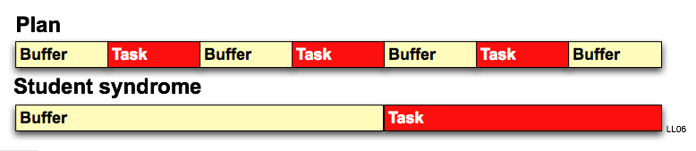 Het principe van het studenten syndroom (student syndrome) geïllustreerd. April 2006 Laurens van Lieshout.